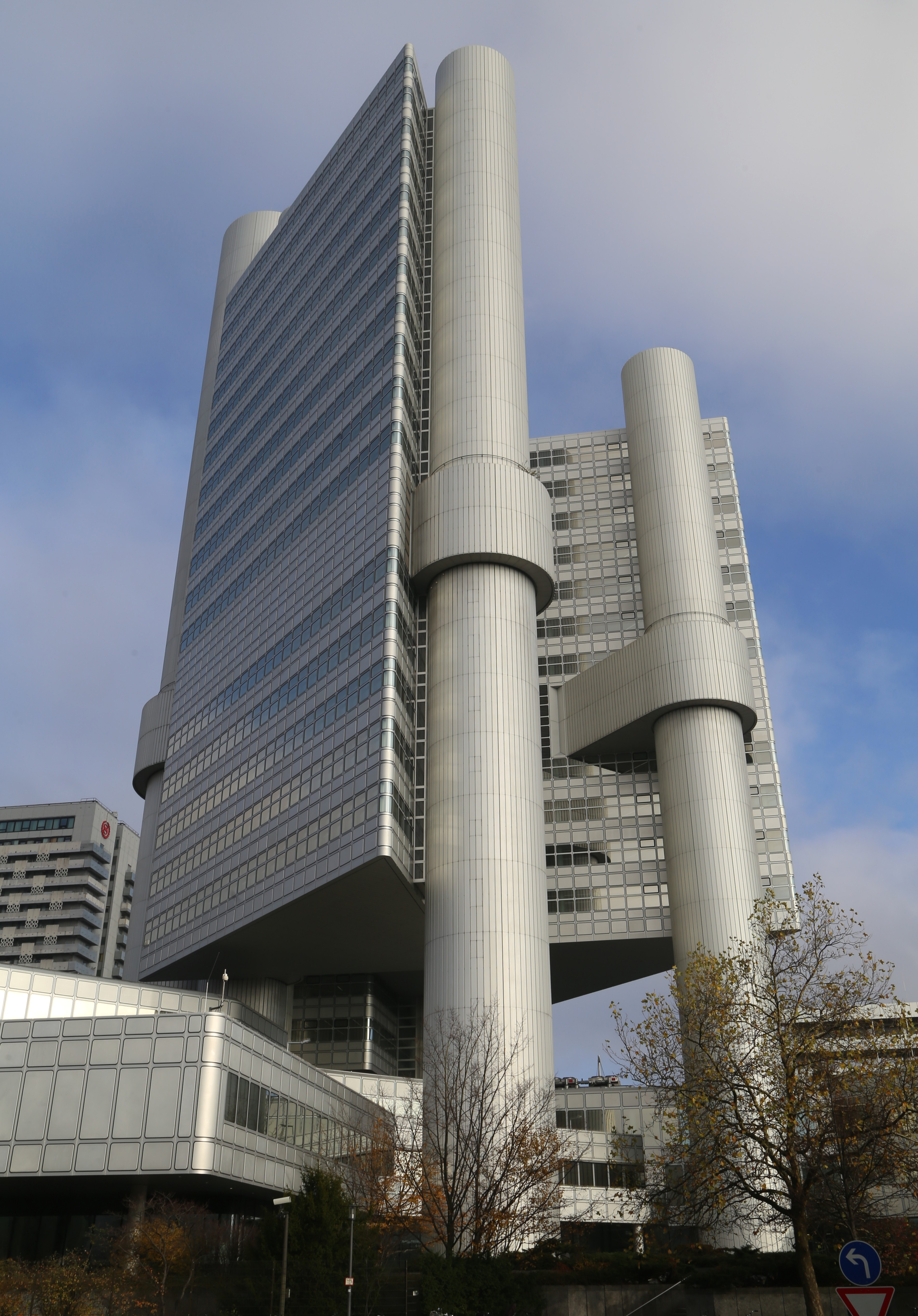 Arabellastraße 10/12, Denninger Straße 23, München; HVB Tower, Verwaltungszentrum der HypoVereinsbank, einprägsame Gebäudegruppe von städtebaulicher Dominanz, aus „Flachbau“ und „Hochhaus“ bestehend, 1975–81 von Walther und Bea Betz; „Flachbau“: zweiflügeliges, breitgelagertes, bis fünfstöckiges terrassiertes Basisgebäude über versetzten Trapezgrundrissen (Repräsentationsräume, Sozialeinrichtungen, Schwimmbad, EDV-Anlage); im Gelenk der beiden Flügel das „Hochhaus“ (Büronutzung), dessen drei prismatische, unterschiedlich hohe Baukörper (bis 114 m) zwischen vier Rundtürmen eingestellt sind; Stahlbetonbau, Verkleidung mit einer vorgehängten Fassade aus Aluminiumelementen; reversible, als Groß- und Einzelraum nutzbare Büroflächen.